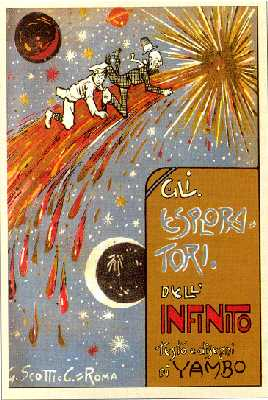 Copertina del romanzo Gli esploratori dell'infinito di Yambo, 1906.